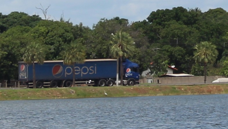 Carreta da Pepsi Cola na BR-343 em Campo Maior, no Piauí, Brasil.